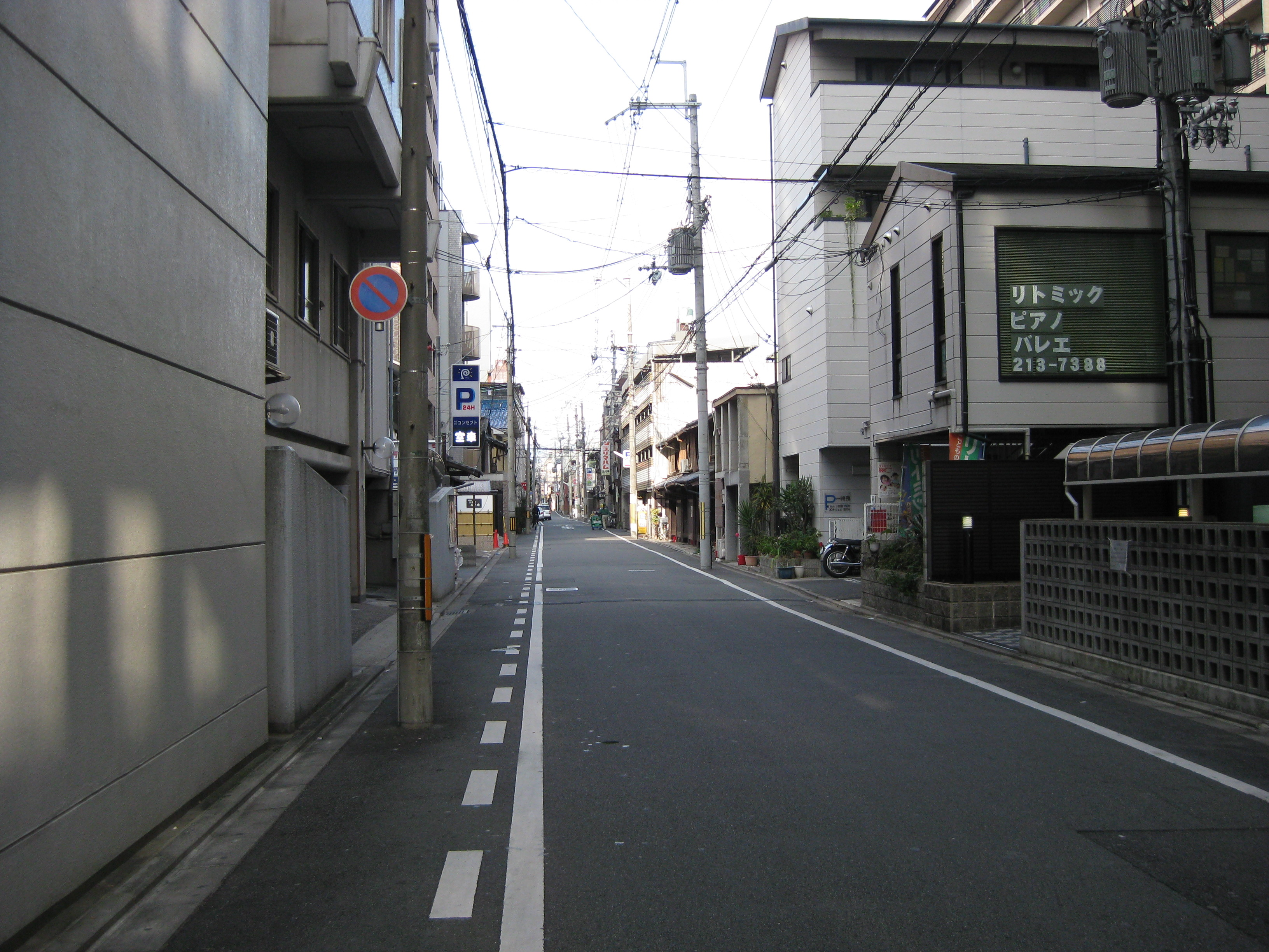 車屋町通。北方向に撮影（押小路通付近）